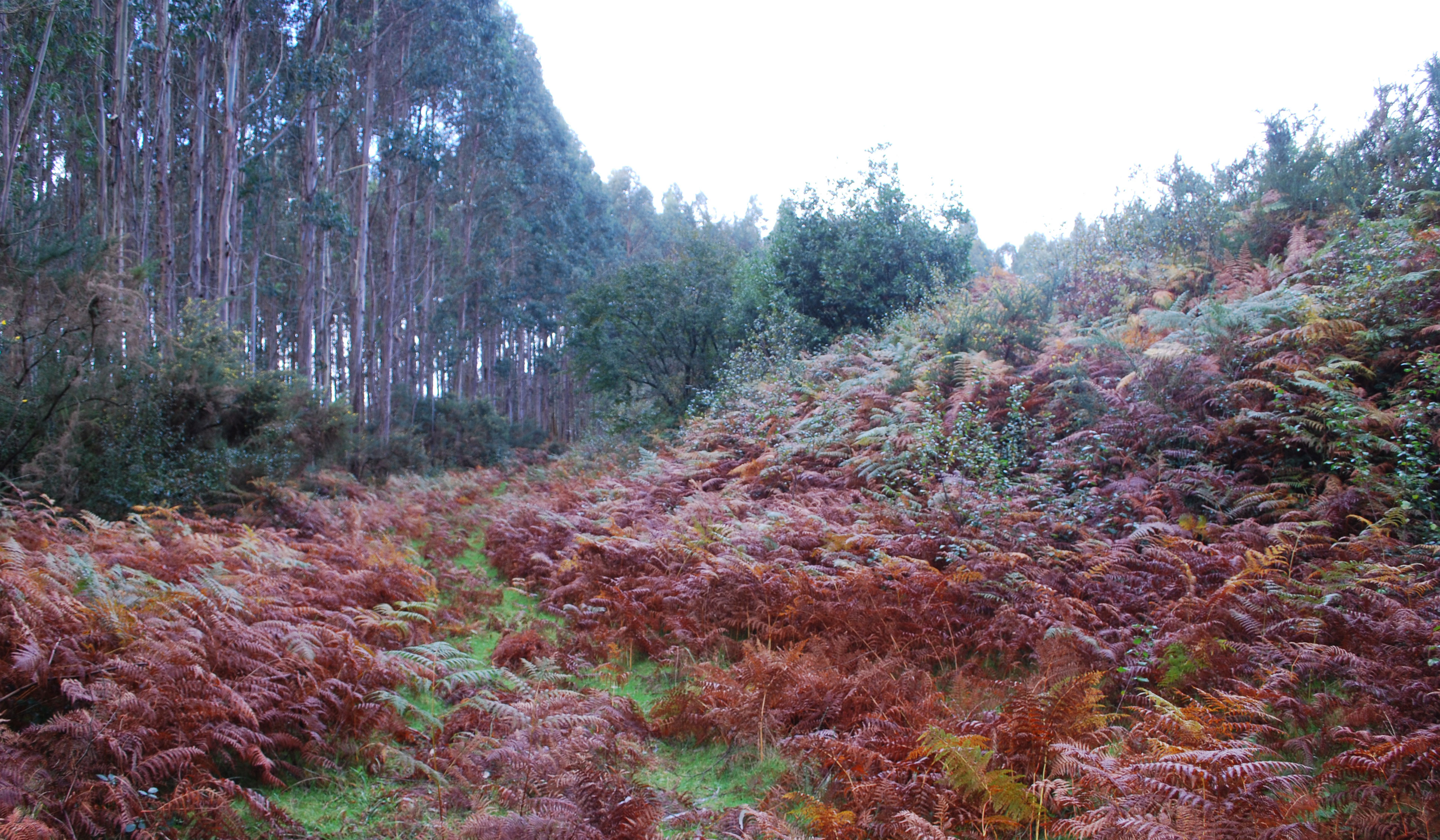 Croa castro croa de leixa Ferrol A Coruña Galiza Spain